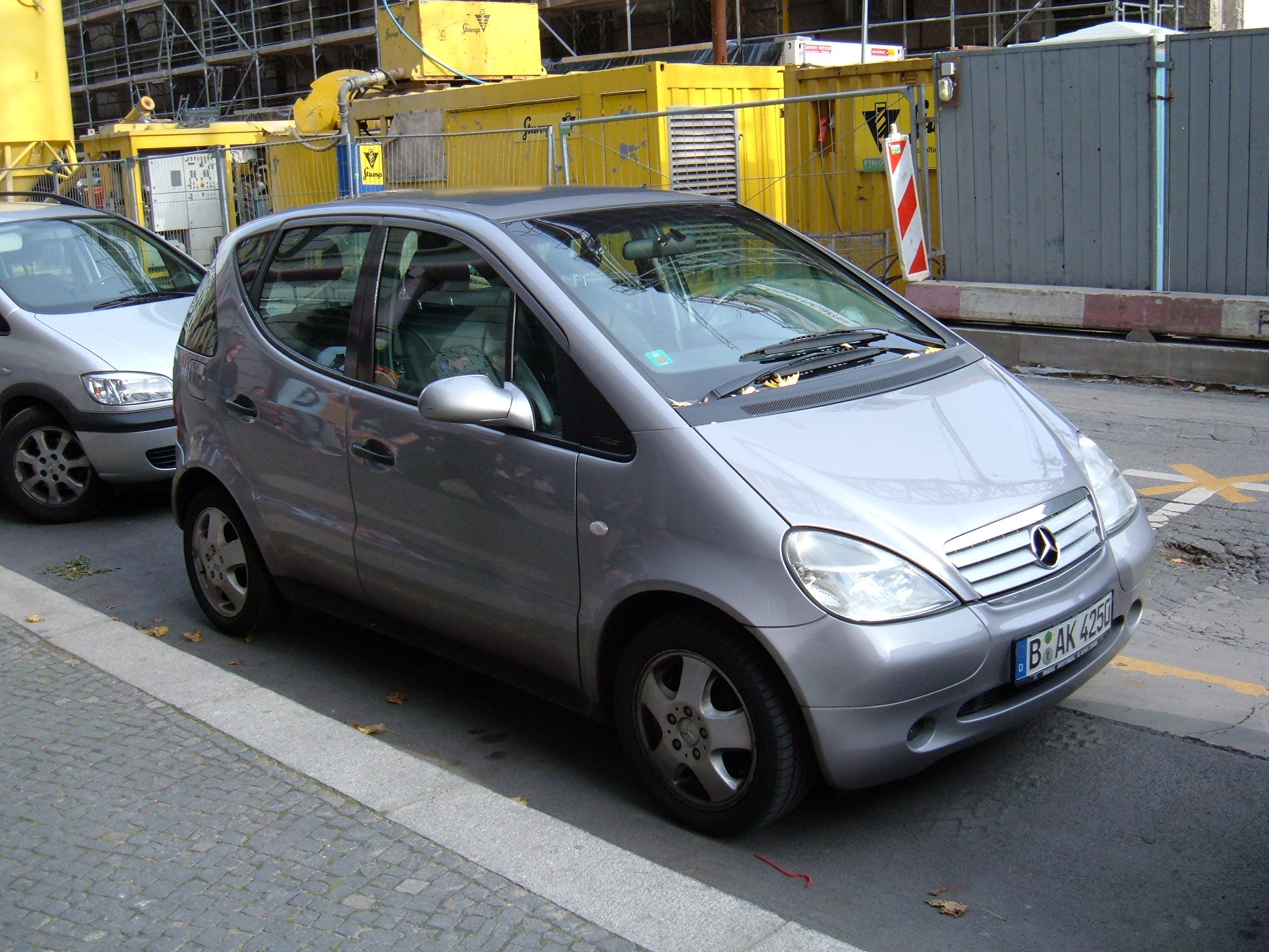 A Mercedes-Benz A140 in Berlin, Germany.